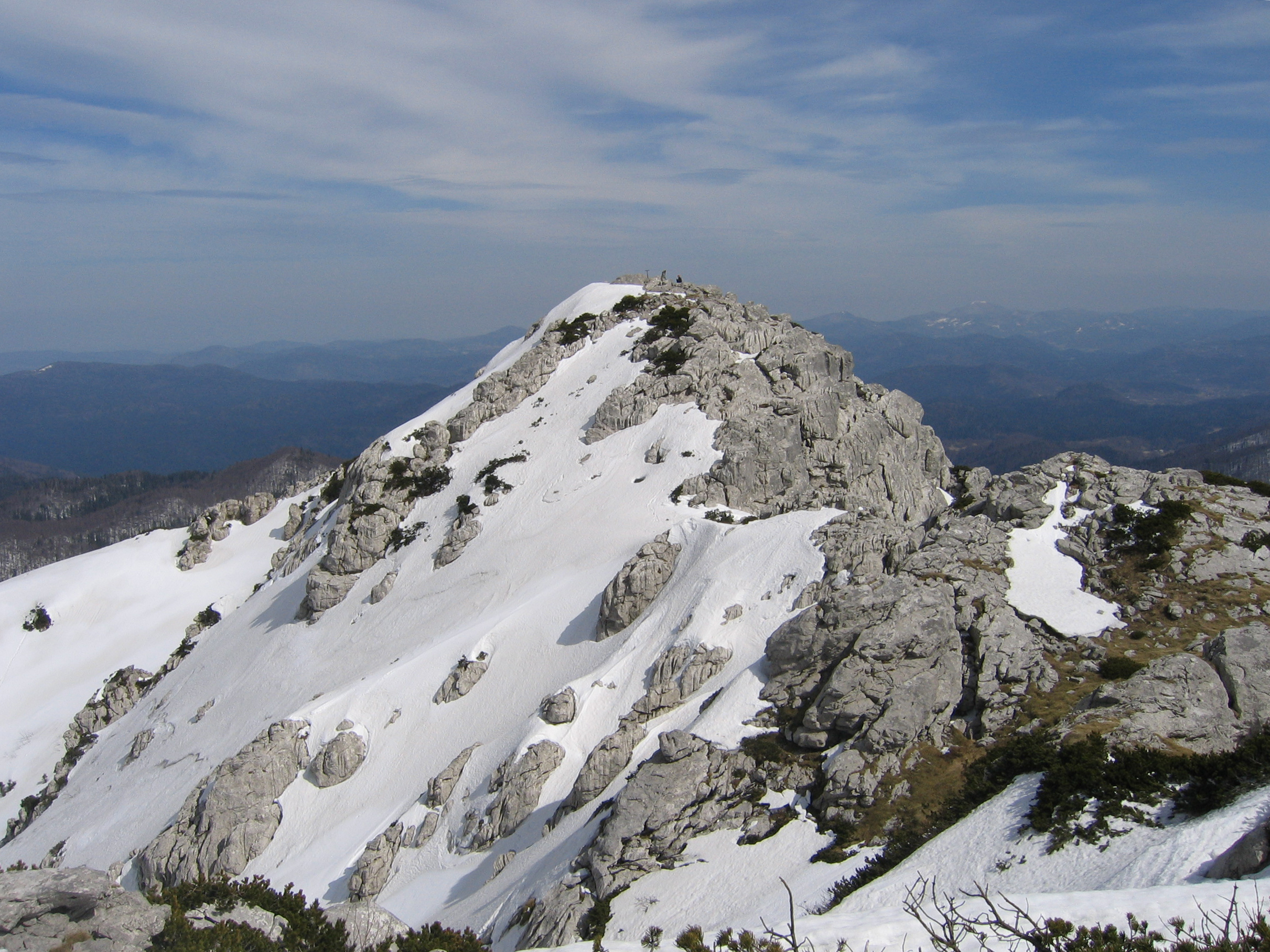 versant nord du Risnjak